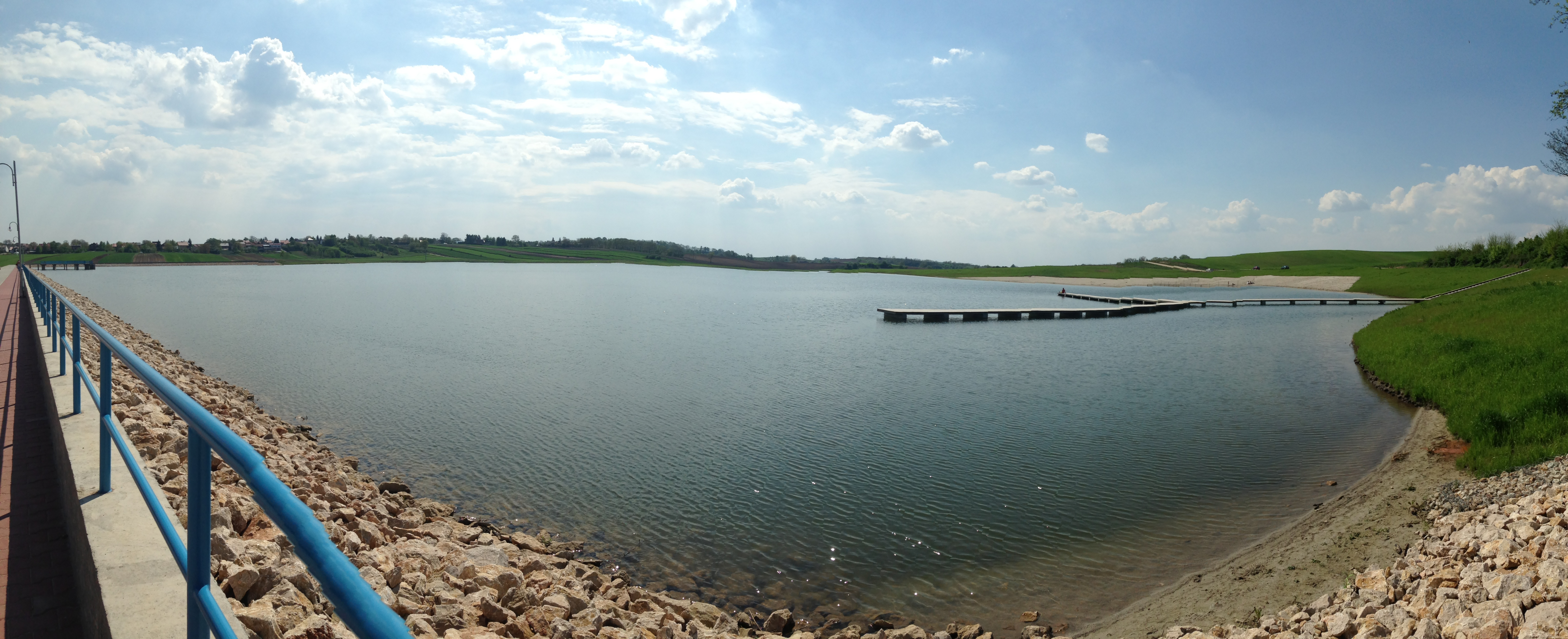 Panorama zbiornika retencyjnego na terenie Kazimierzy Wielkiej